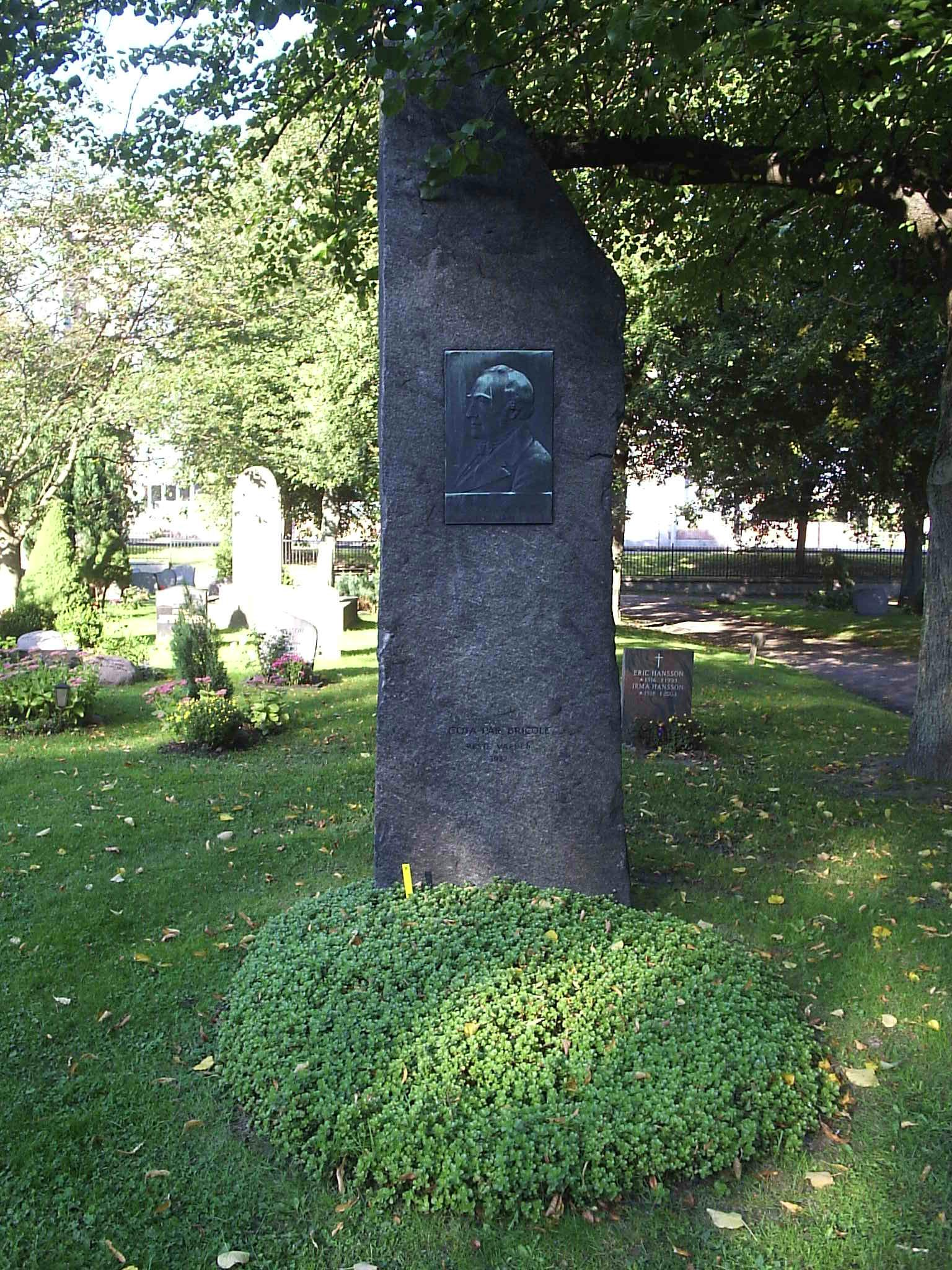 Bilden är fotograferad av Harri Blomberg. Vid sidan om fakta om Wadman, står det "Göta Par Bricole reste vården 1937". Photo by Harri Blomberg.